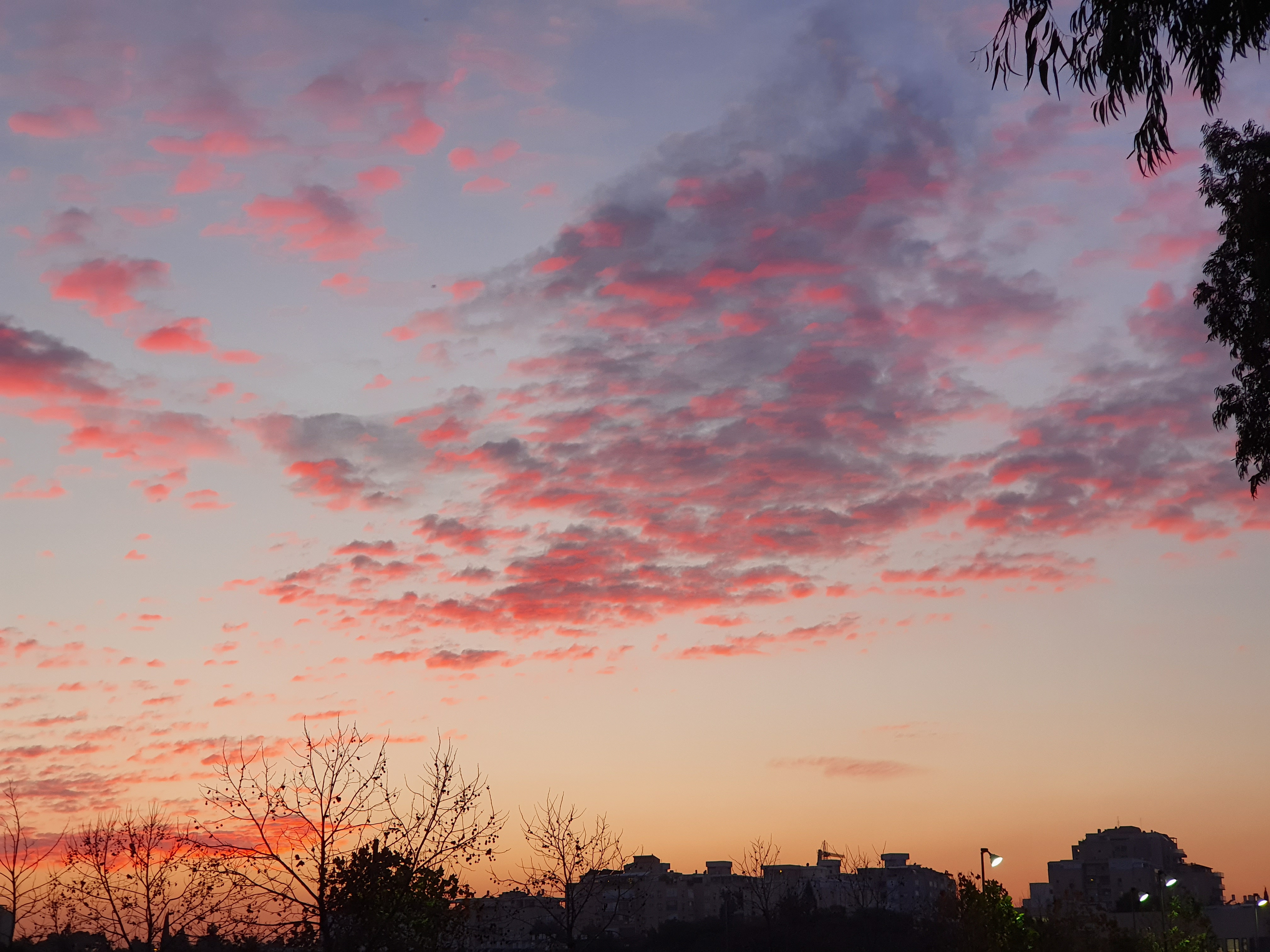 דמדומים ברמת השרון